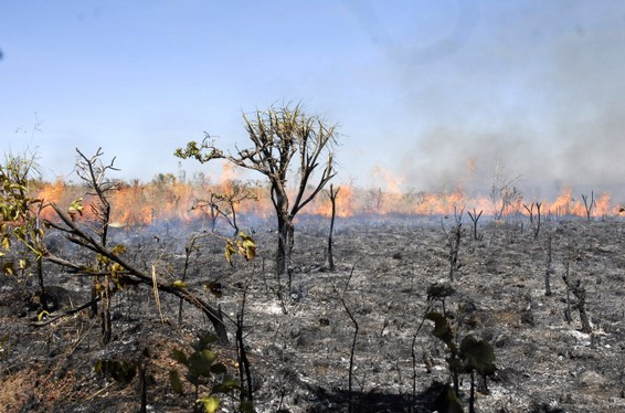 Incêndio no Parque Nacional de Brasília; queimada e destruição ambiental.